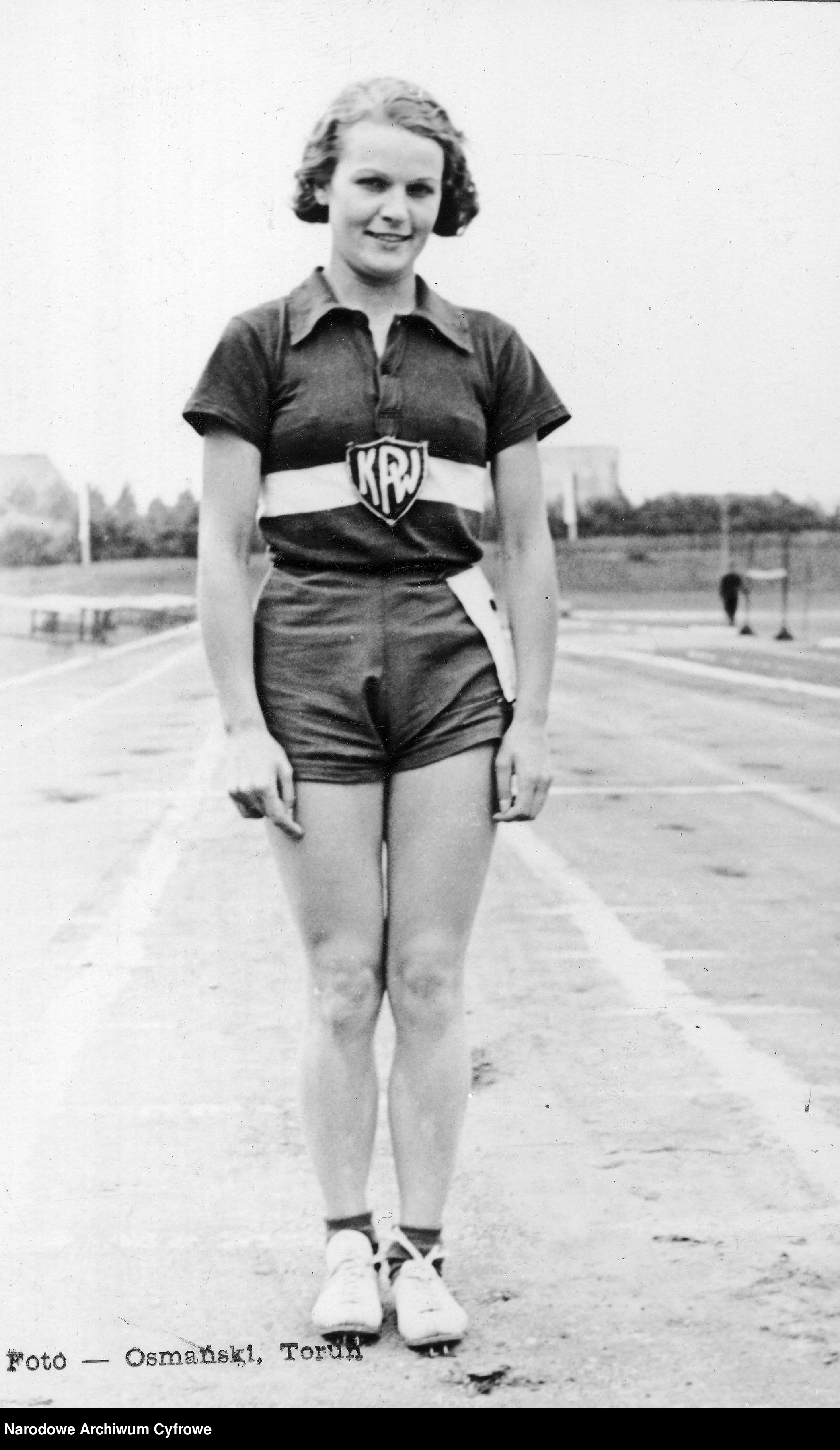 Barbara Książkiewicz, lekkoatletka KPW Pomorzanin Toruń